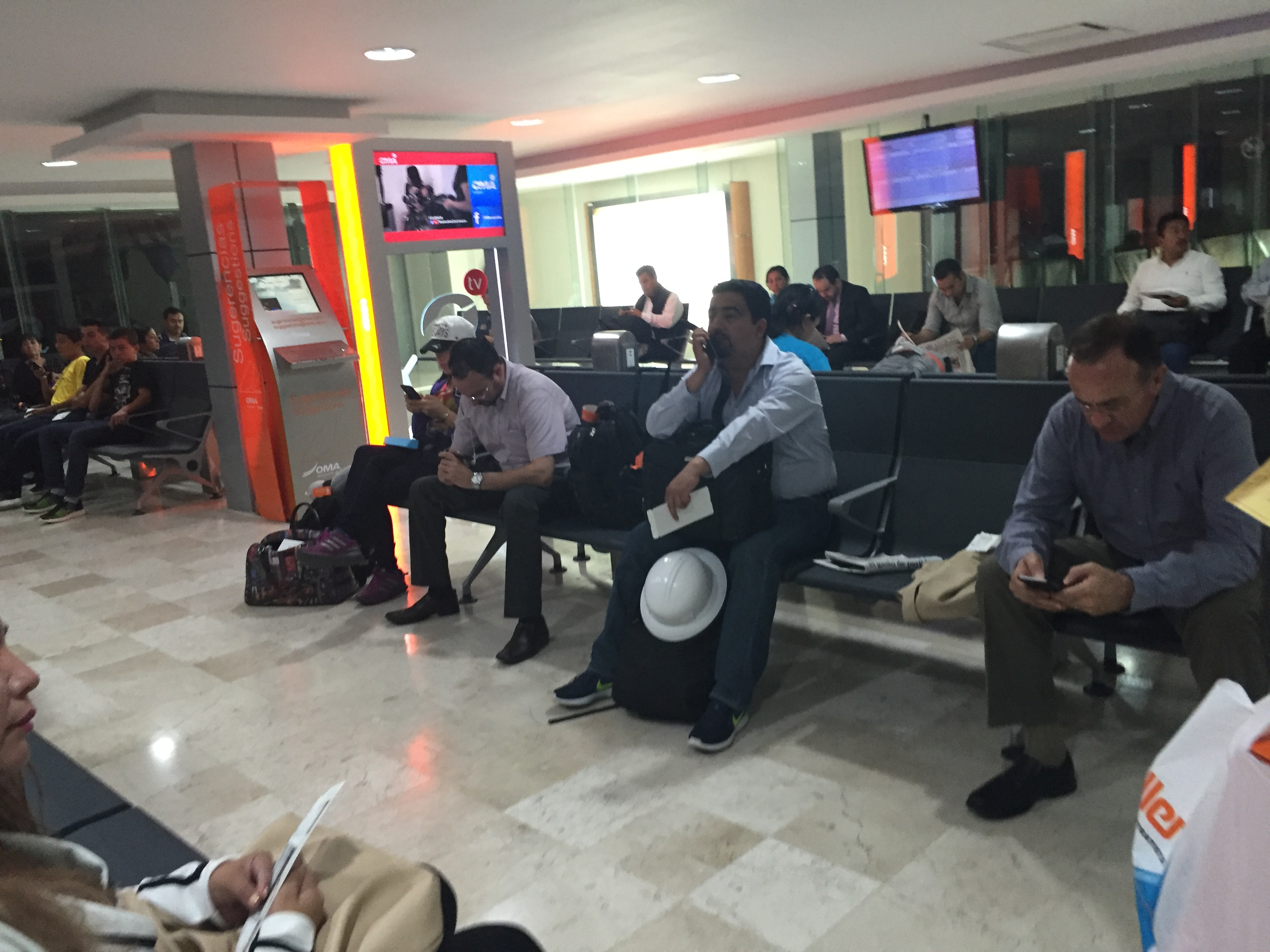 Sala de abordaje del Aeropuerto Internacional de Tampico.